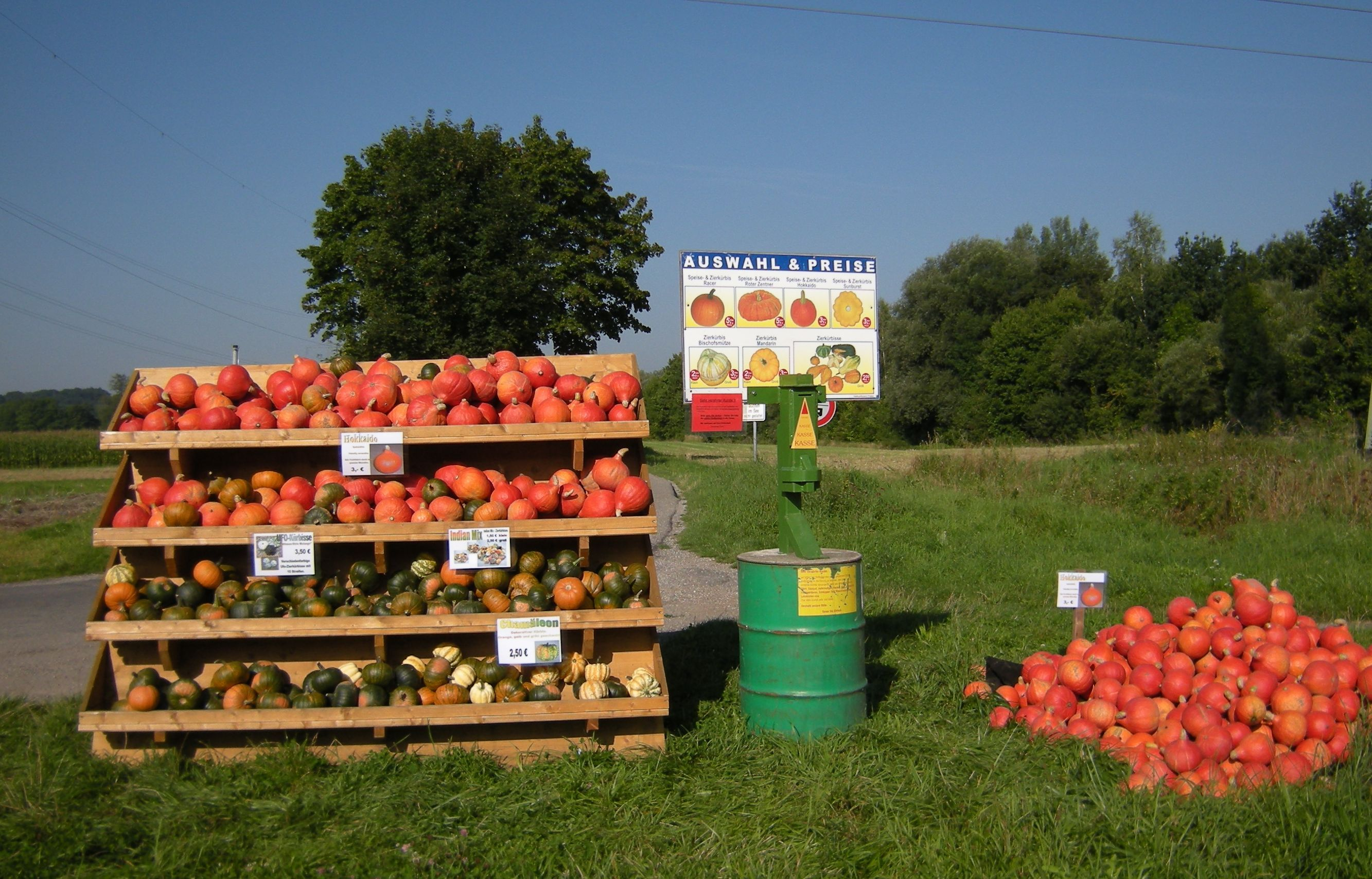 Präsentation der Kürbisernte